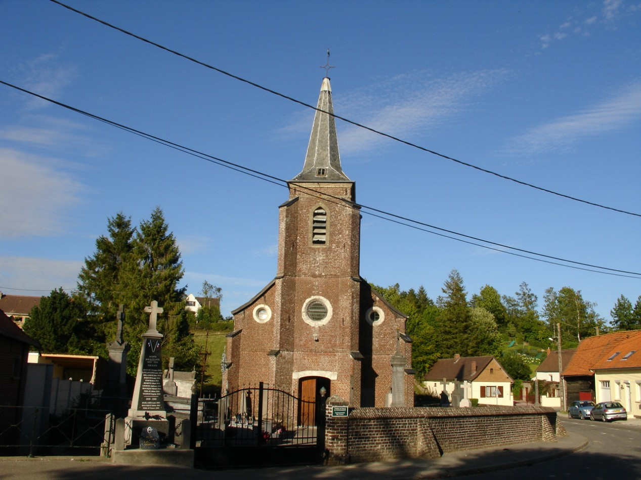 Église de Vaudringhem